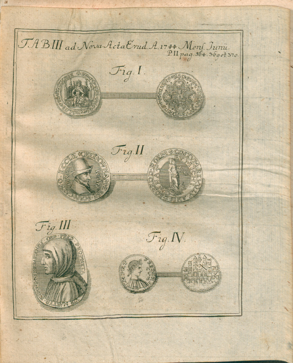 Illustration